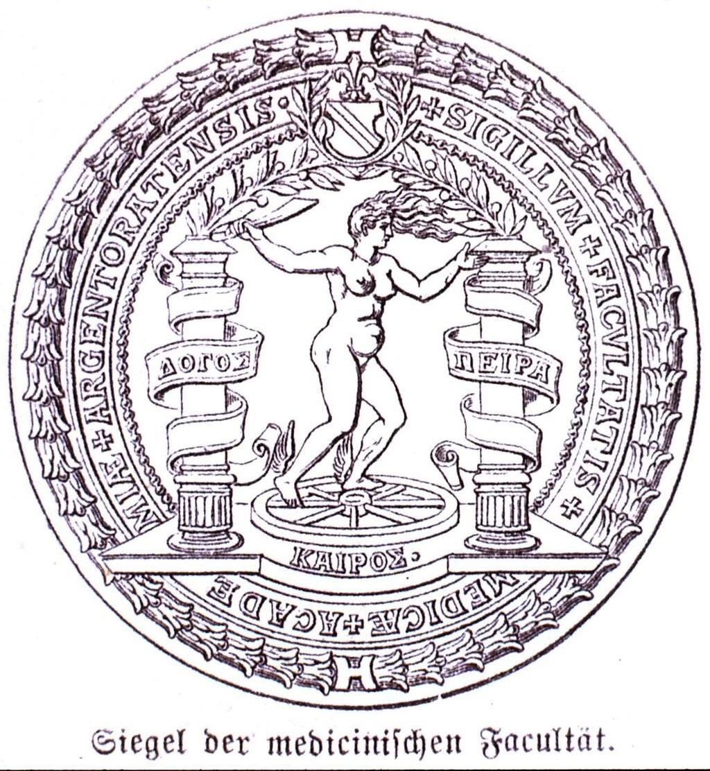 Titre : Siegel der medicinischen Facultaet Éditeur : Weber F (Leipzig) Date d'édition : 1872 Sujet : Strasbourg Sujet : STRASBOURG, Faculté de Médecine, Sceau Type : image fixe Langue : Allemand Format : 4,5 x 4,5 cm Format : image/jpeg Droits : domaine public Identifiant : ark:/12148/btv1b102170250 Source : Bibliothèque nationale et universitaire de Strasbourg, NIM29542 Relation : Description : Appartient à l’ensemble documentaire : BNUStr003 Provenance : bnf.fr Date de mise en ligne : 23/09/2013